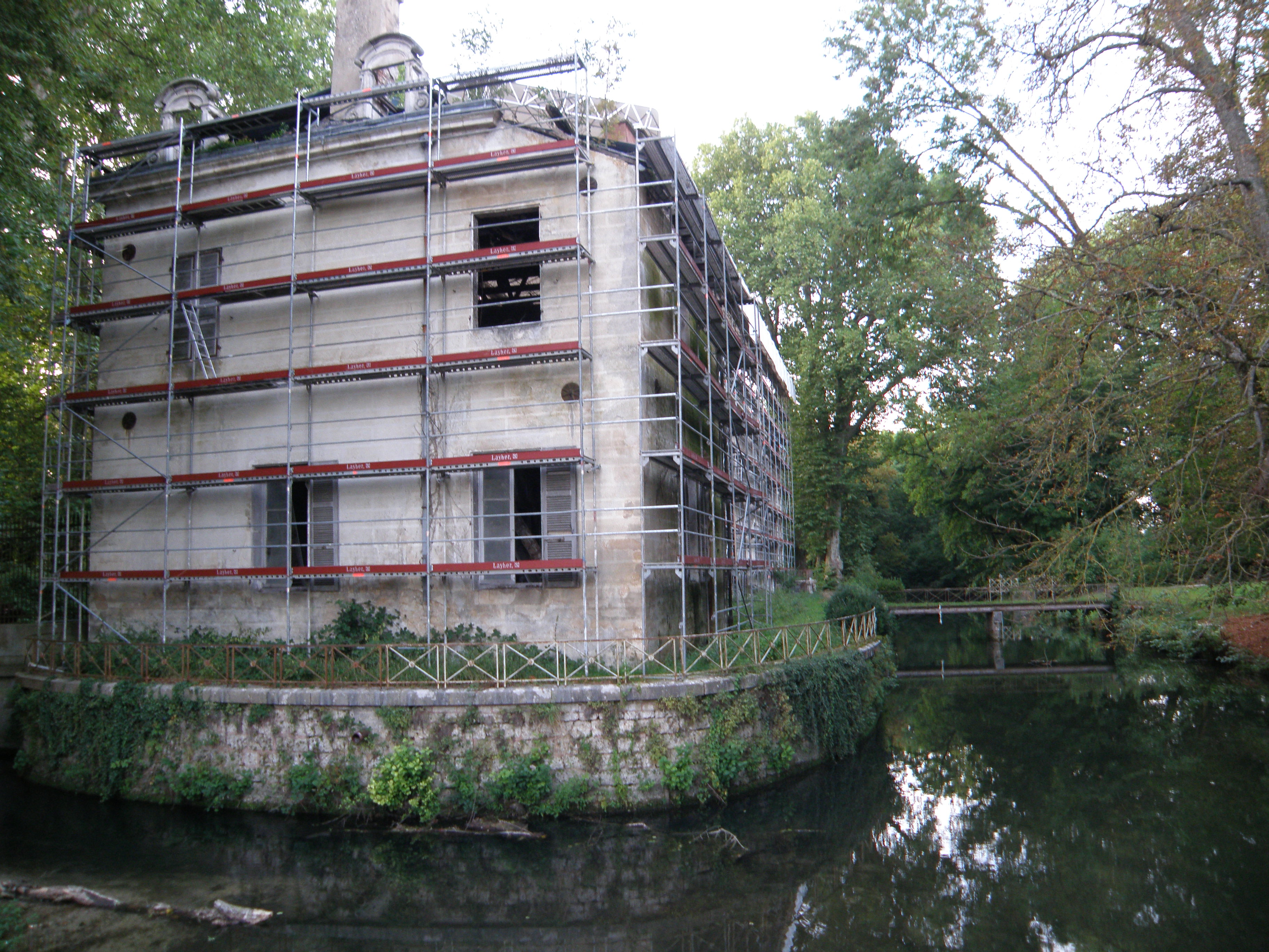 Château de Polisy; 10110 Polisy